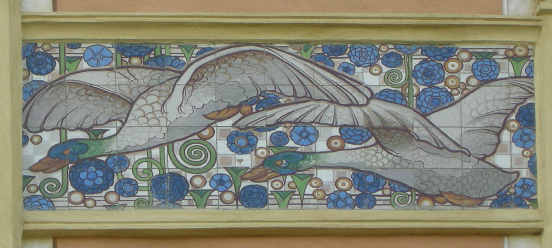 Villa Del Magro, dettaglio